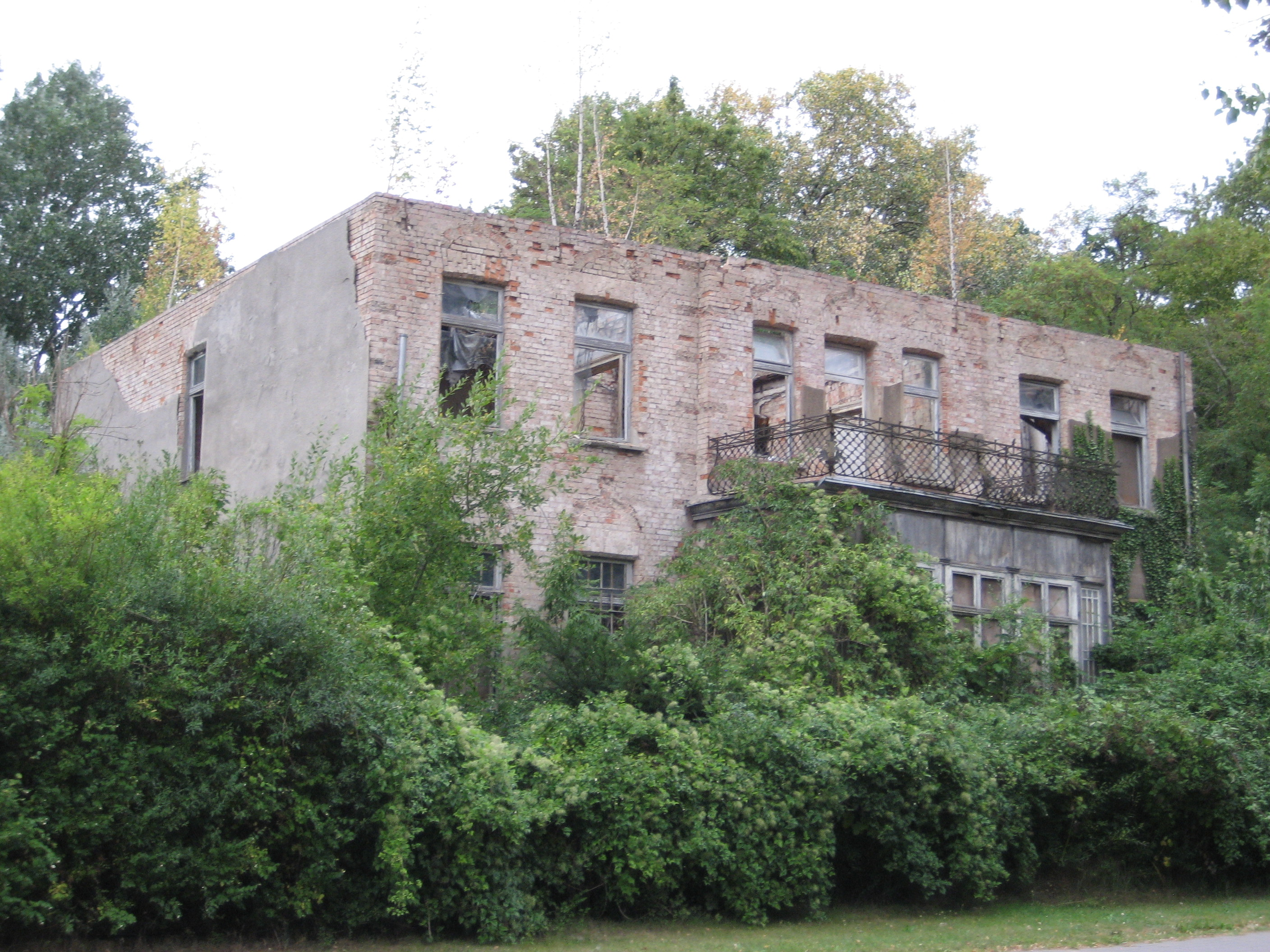 Villa Schulz in der Bahnhofstraße 5 in der später das Amtsgericht Strasburg (Uckermark) untergebracht war.